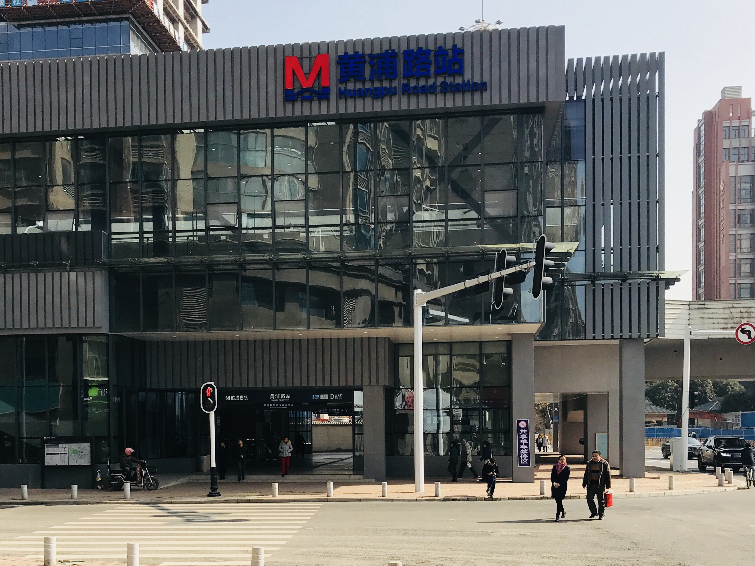 武汉地铁黄浦路站